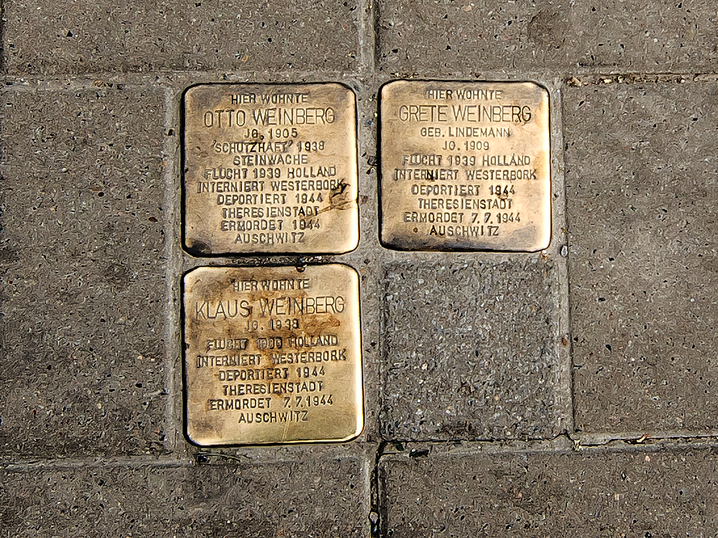 Stolpersteine von Grete Klaus Otto Weinberg in Dortmund